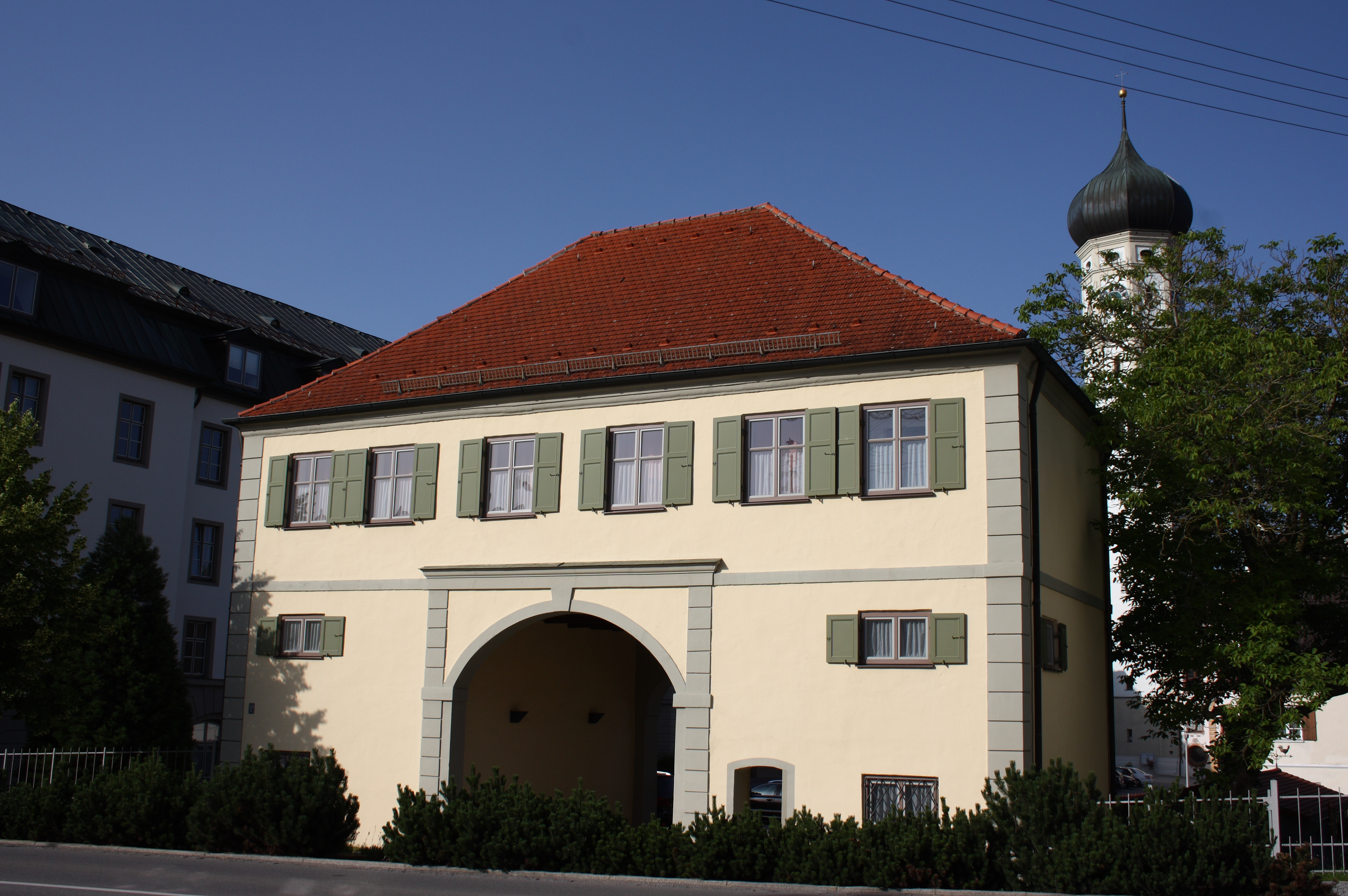 Kloster Ursberg in Ursberg im Landkreis Günzburg (Bayern), Turm der Pfarrkirche St. Johannes Evangelist und Petrus (ehemalige Klosterkirche), Torhaus von 1723